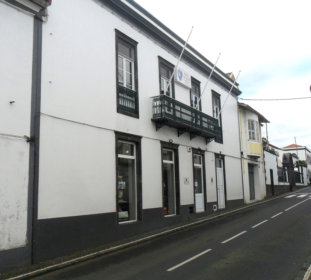 Fotografia da Sede Lealdade